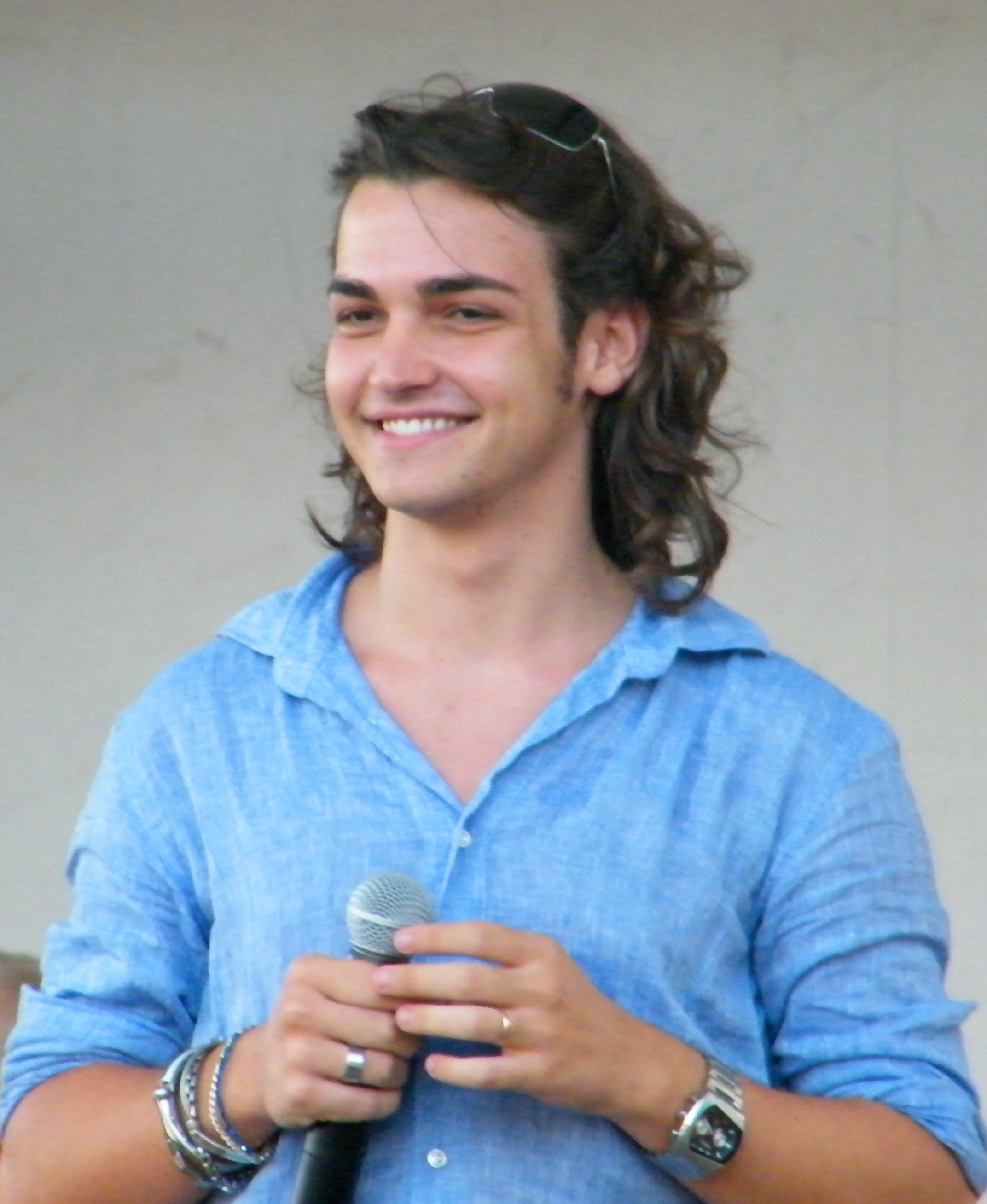 Valerio Scanu a La Maddalena (Italia) prova per il concerto